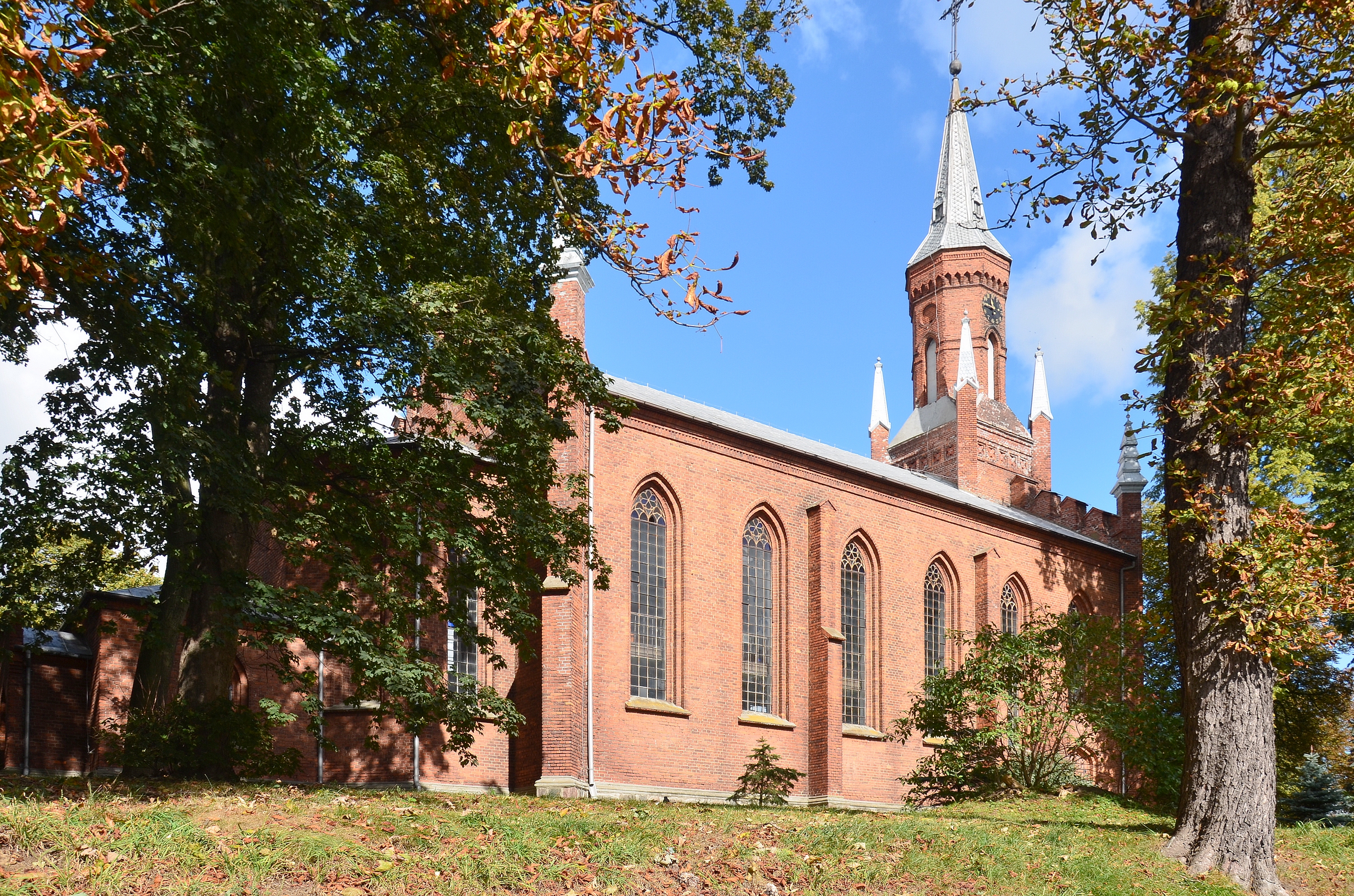 Kościół ewangelicko-augsburski (luterański), 1883-1888 r.